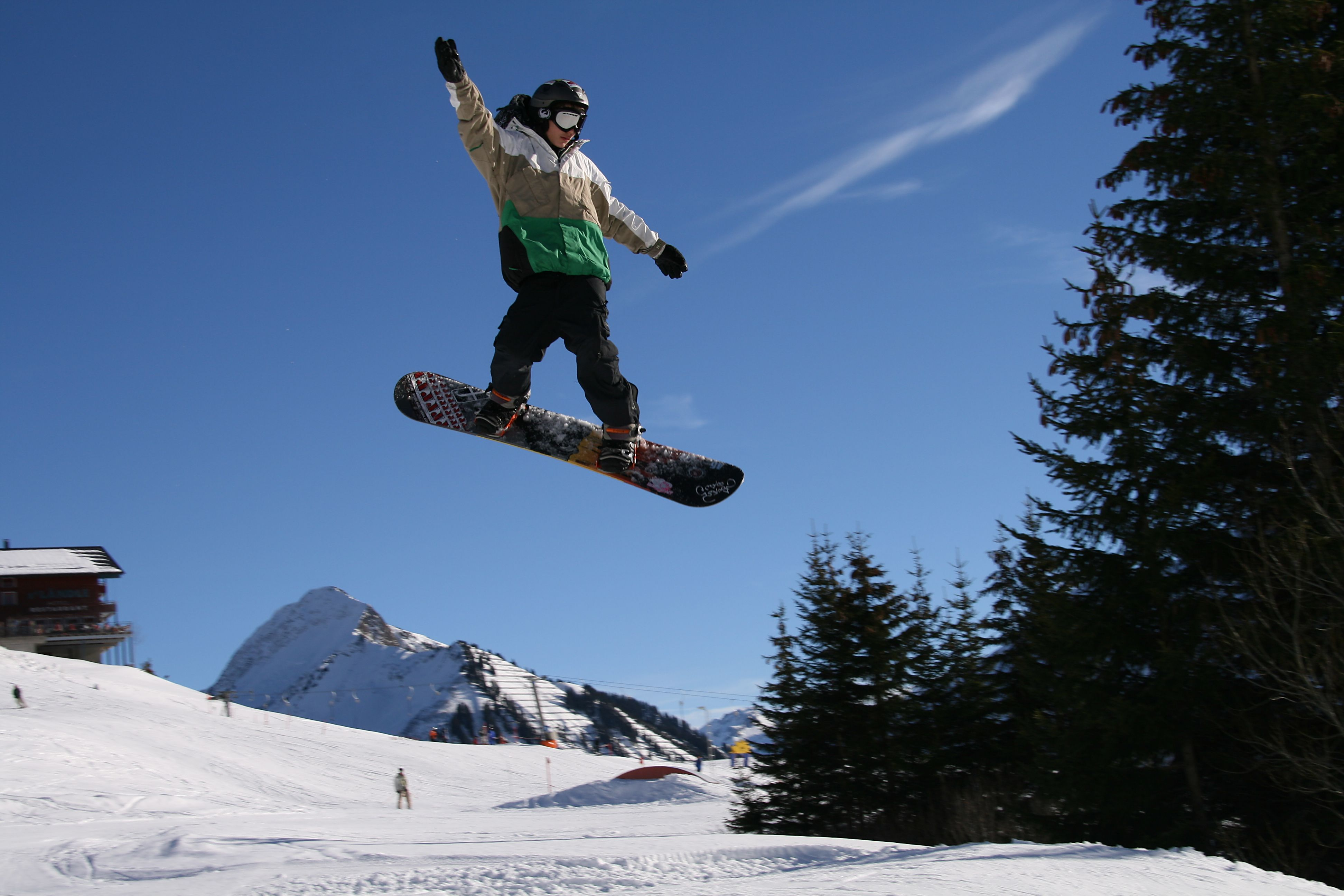 junge Bregenzerwälder beim Schanzen in Damüls-Krumbach in Vorarlberg.